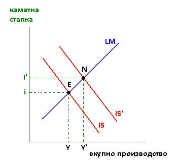 Експанзивната фискална политика ја поместува IS кривата надесно до IS' , економијата се поместува до точката N, вкупното производство се зголемува на Y' , а каматната стапка се крева на i' .